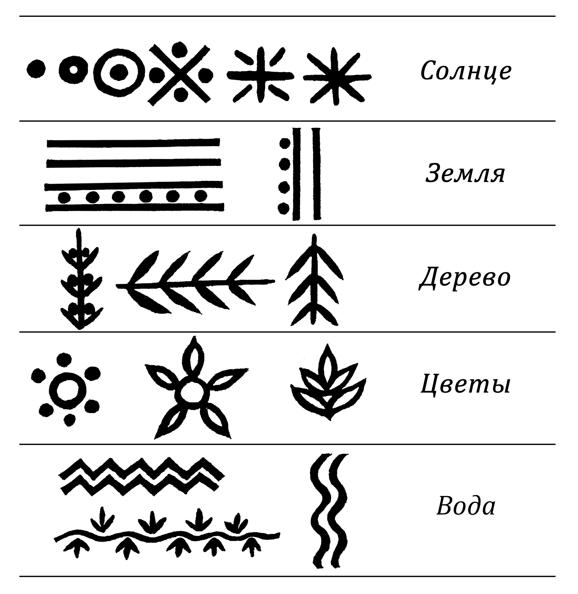 Семантика знака и символа в росписи Старооскольской глиняной игрушки.